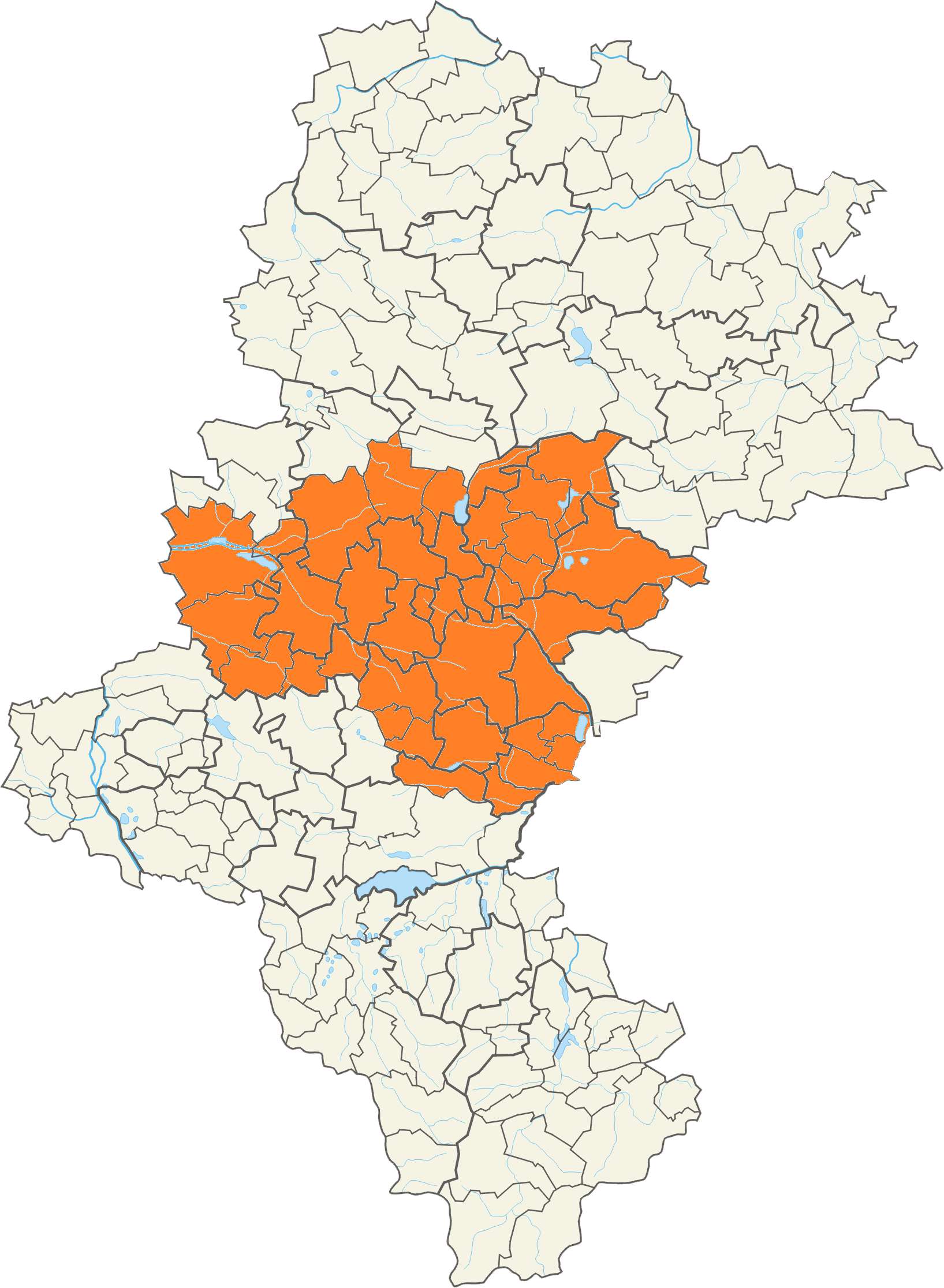 Gminy wchodzące w skład Górnośląsko-Zagłębiowskiej Metropolii w województwie śląskim